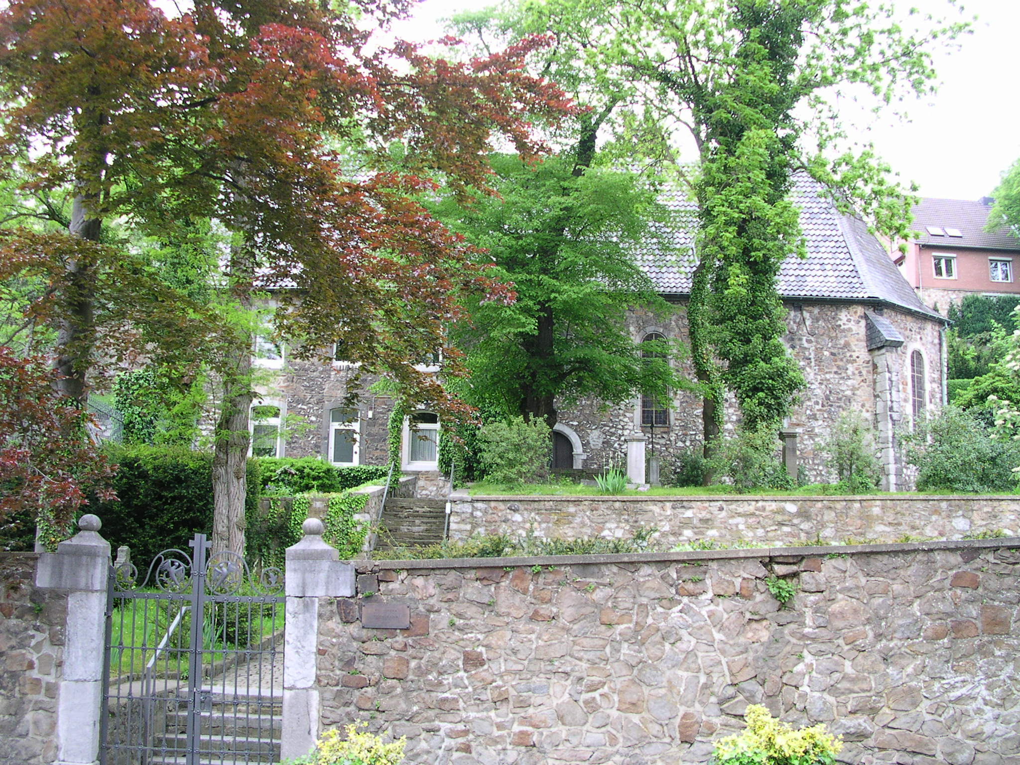 Stolberg, evangelische (lutherische) Vogelsangkirche